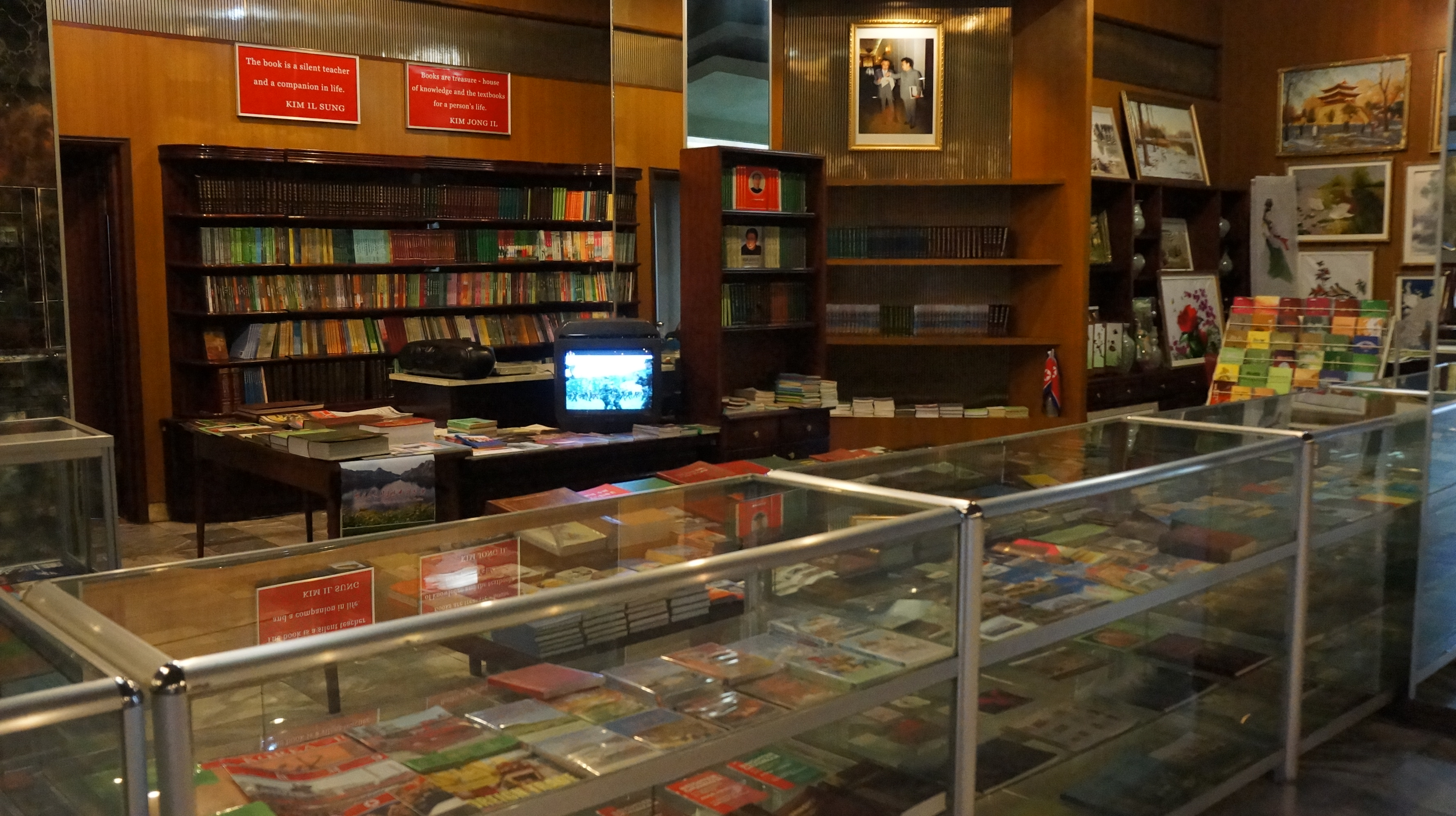 Pyongyang, North Korea DPRK